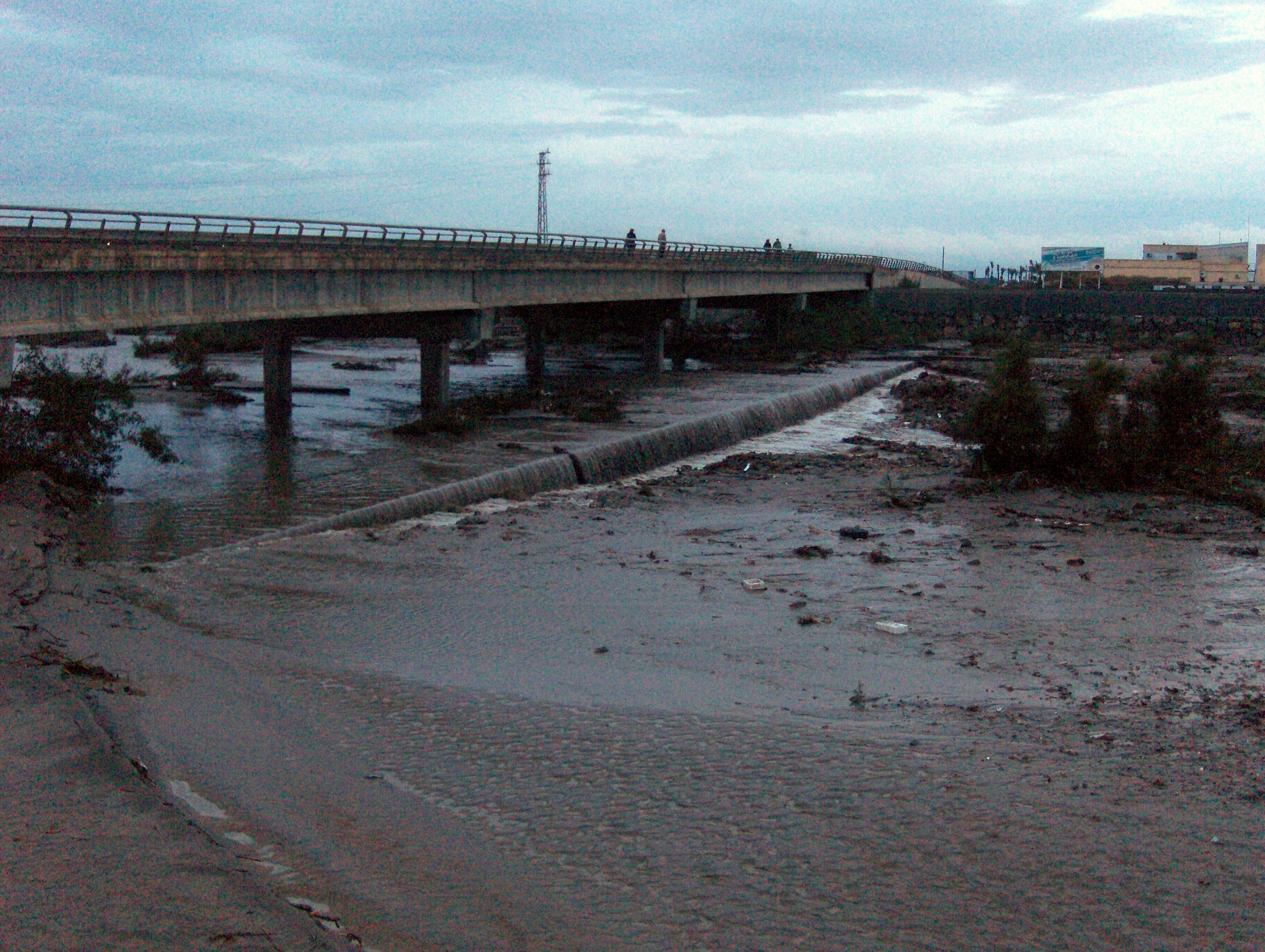 Río Andarax, a su paso por Almería